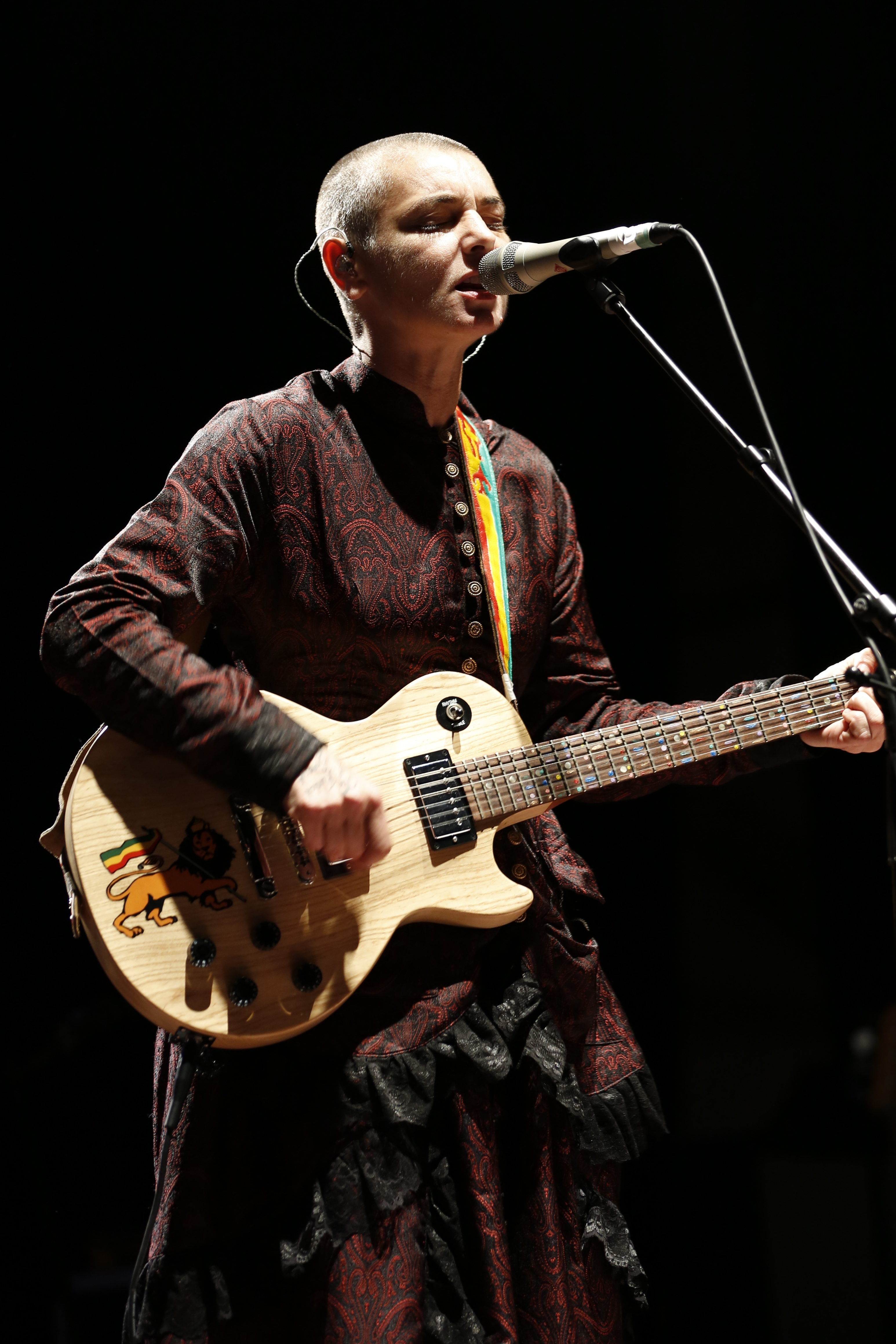 Sinéad O'Connor lors du Festival interceltique de Lorient, le 10 août 2013.